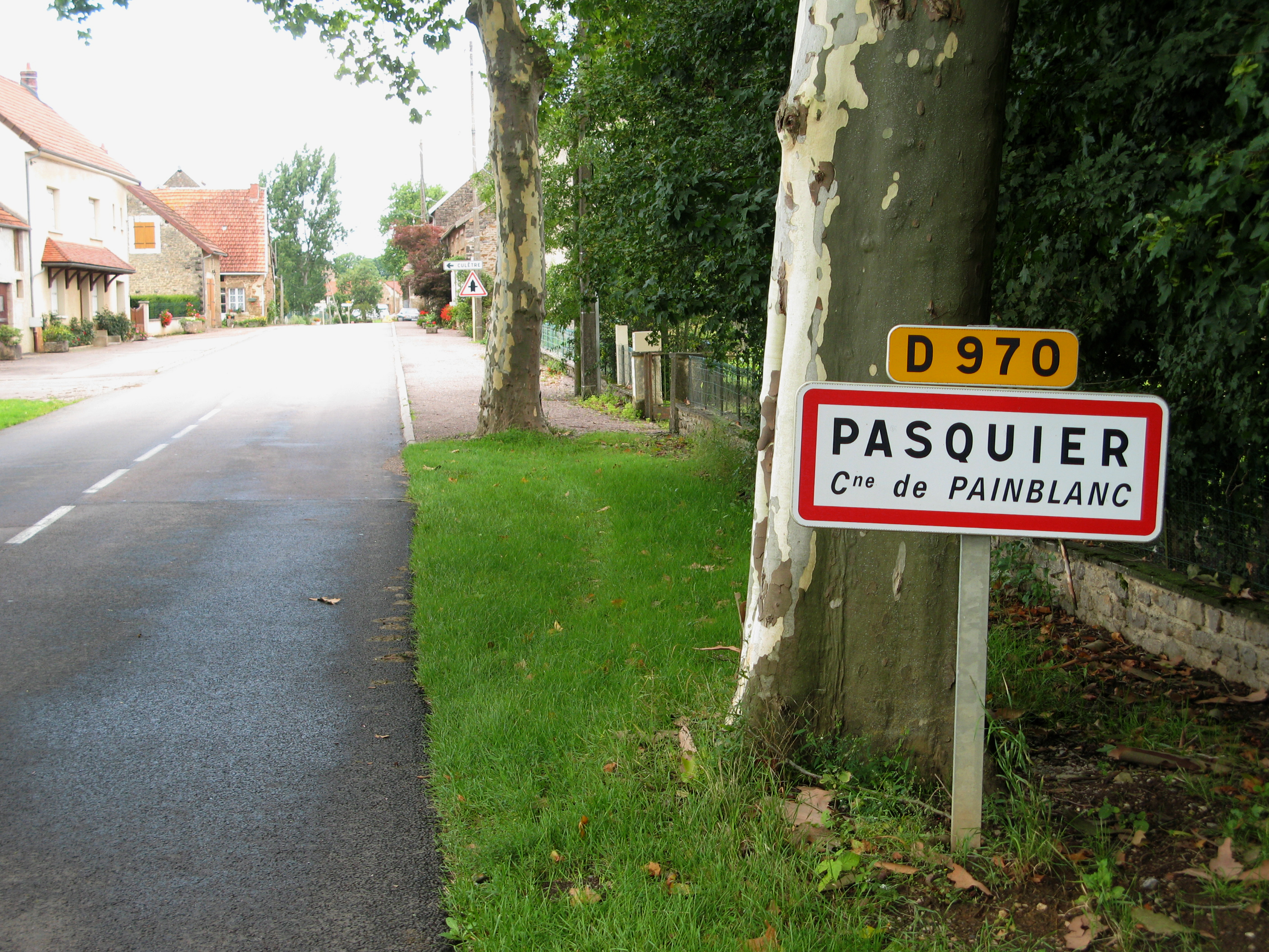 Painblanc (Côte-d'Or, France) - Entrée du hameau de Pasquier. . .